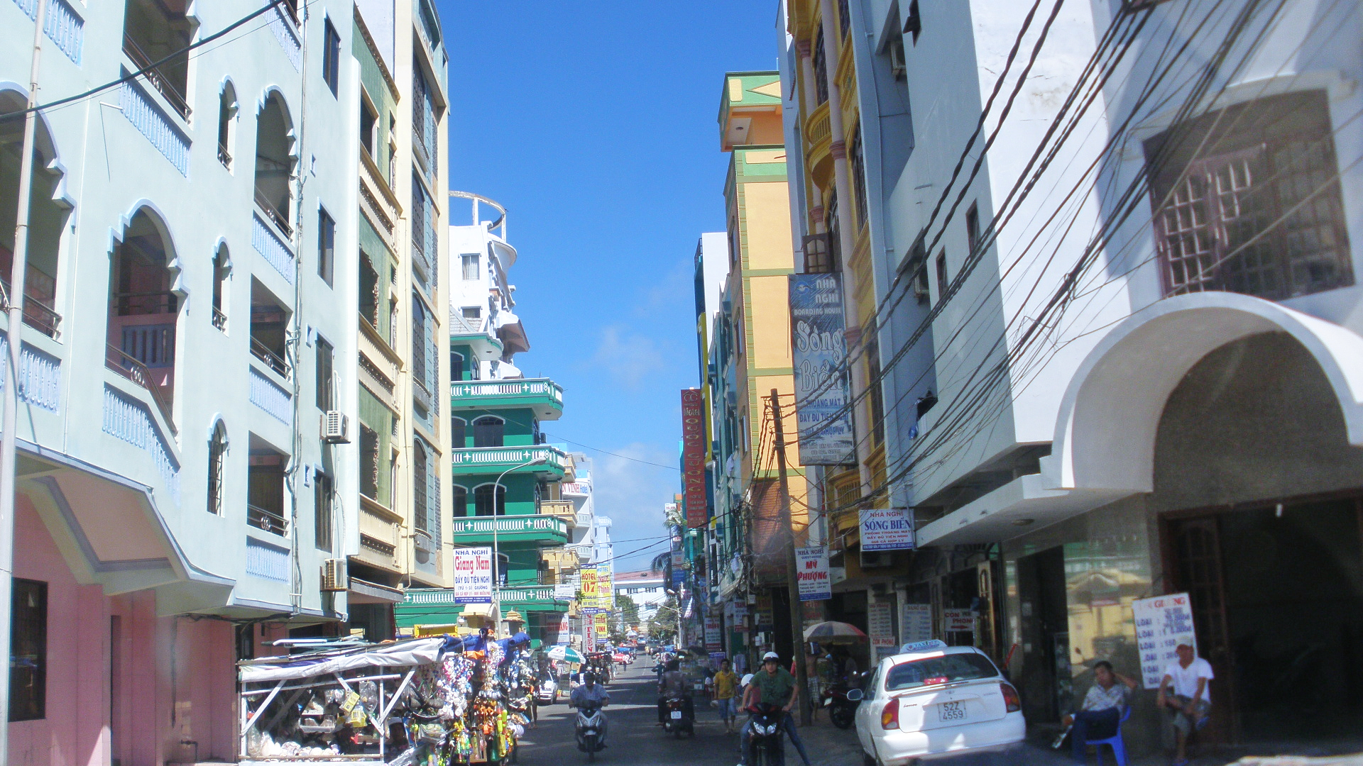 Khách sạn mini đường Phó Đức CHính Vũng Tàu 2011